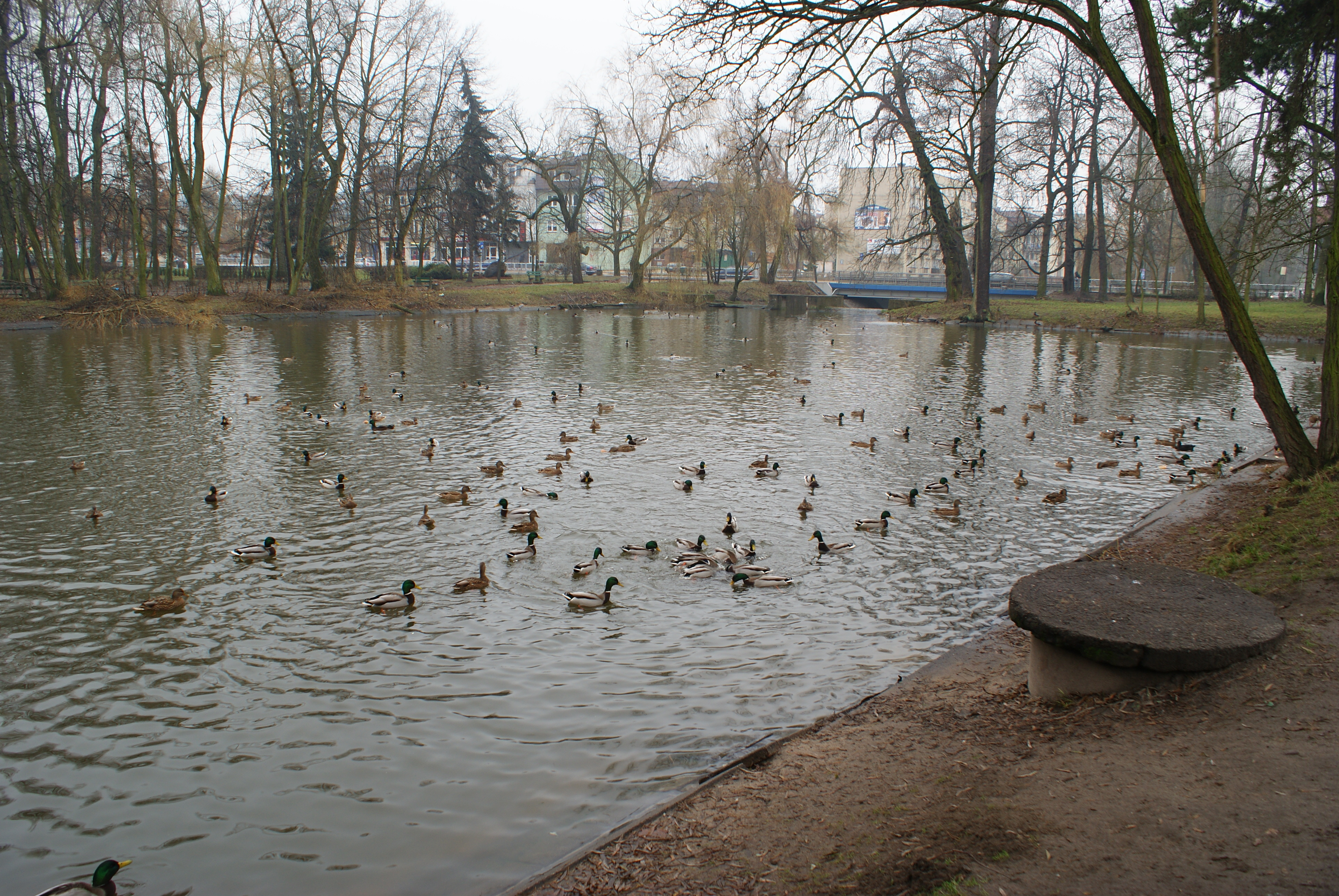 Mińsk Mazowiecki, park, pocz. XVII, pocz. XIX, 1874